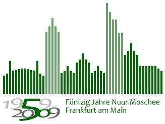 Ganz links ist die Nuur-Moschee abgebildet. Die hell-grünen Gebäude stellen die Wahrzeichen der Stadt Frankfurt am Main dar (von links: Messeturm und Commerzbanktower). Ganz rechts ist der Kaiserdom (größte katholische Kirche in Frankfurt)